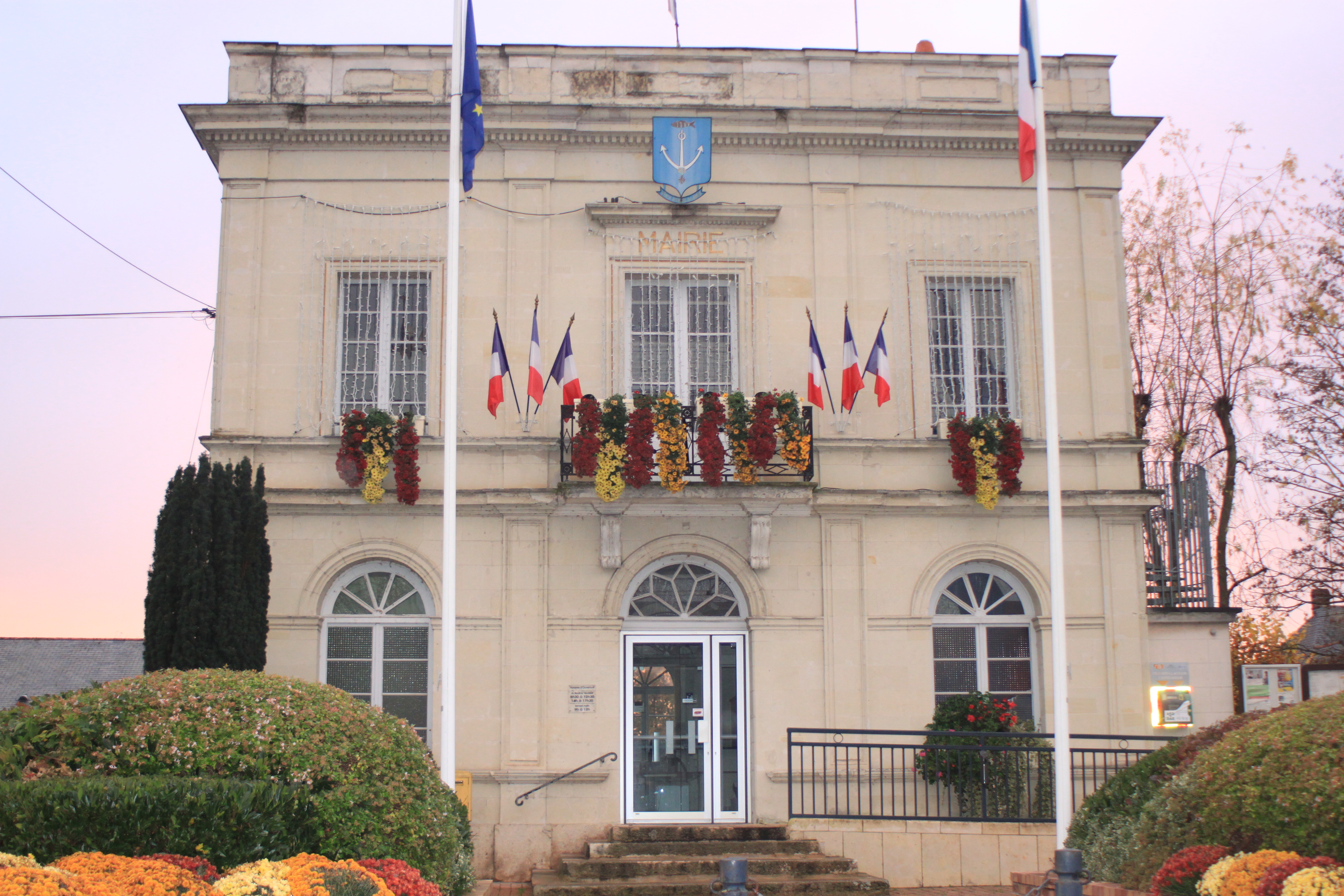 Mairie de Saint-Lambert-des-Levées, Fr-49-Saumur.